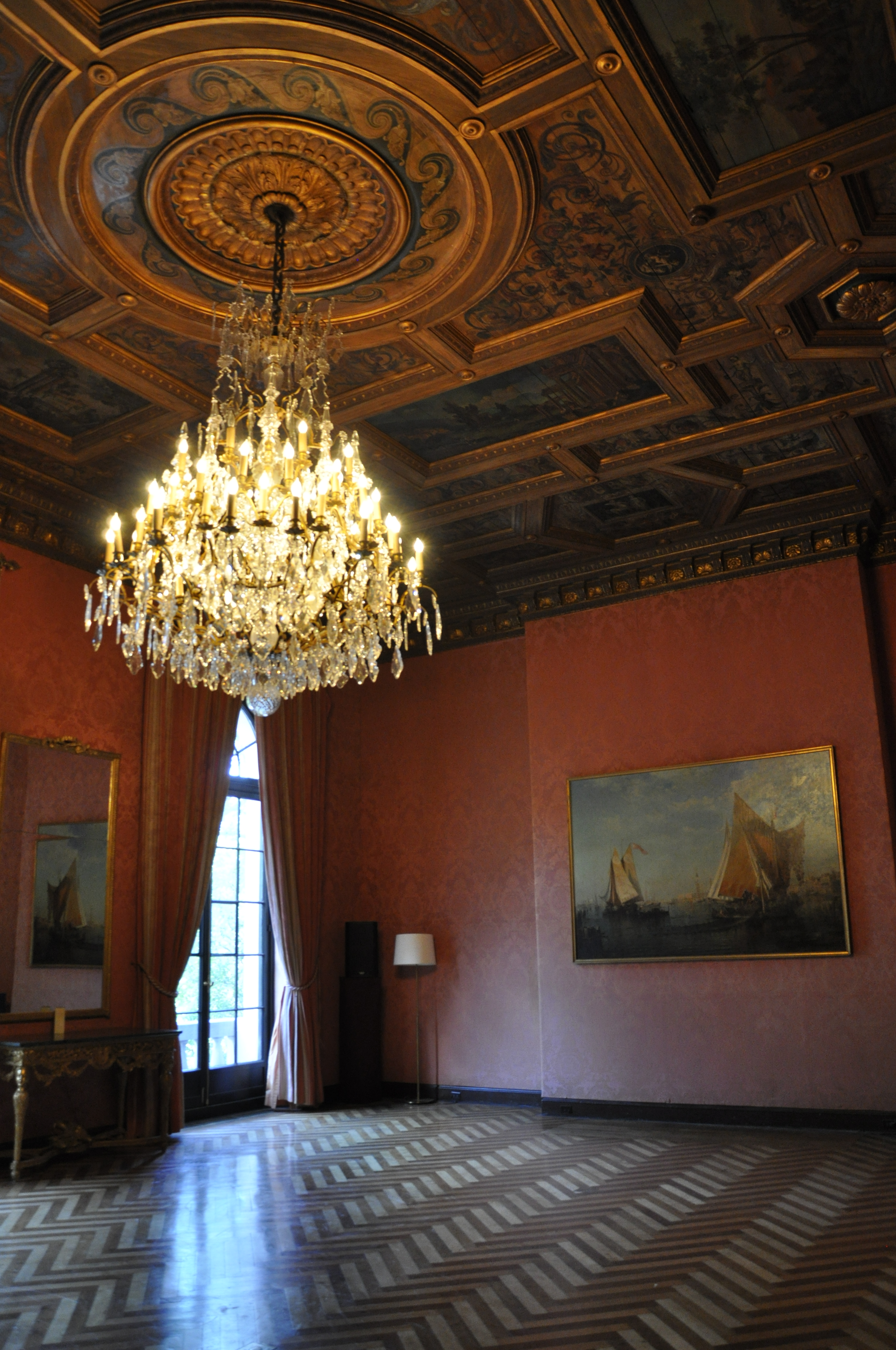 Salon rose du Consulat Général de France à NYC